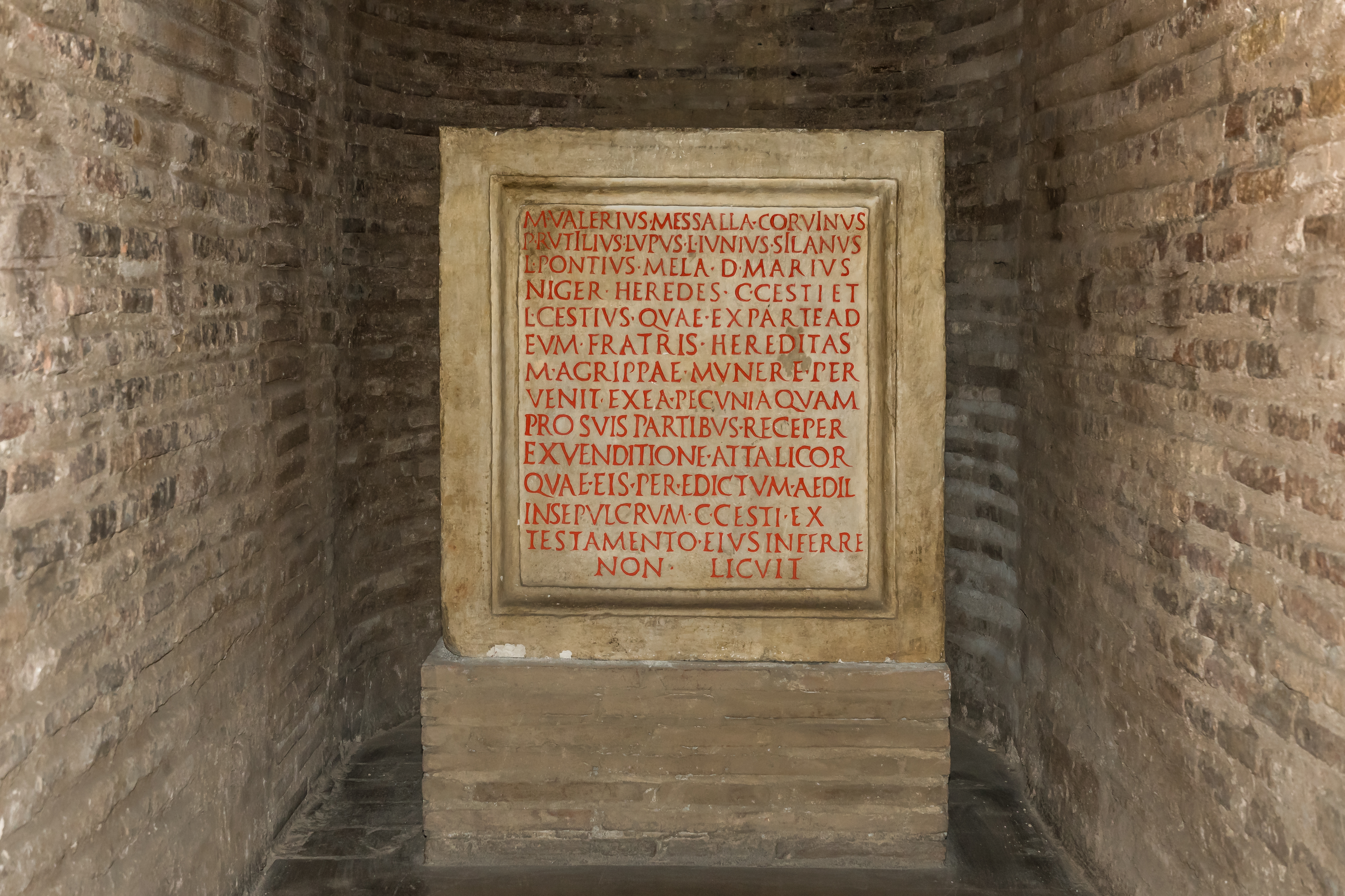 Der Säulensockel mit dem letzten Willen des Gaius Cestius Epulo, ausgestellt im Museum Via Ostiense Porta San Paolo